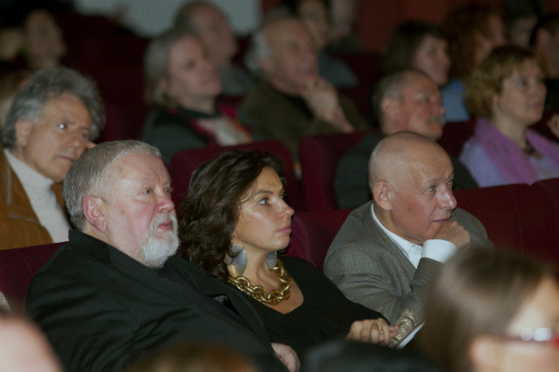 Сергей Соловьев, Иосиф Бакштейн, Наталья Синдеева